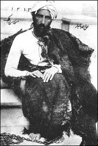 Mirza Reza Kermani, murderer of Nasser ed din Shah